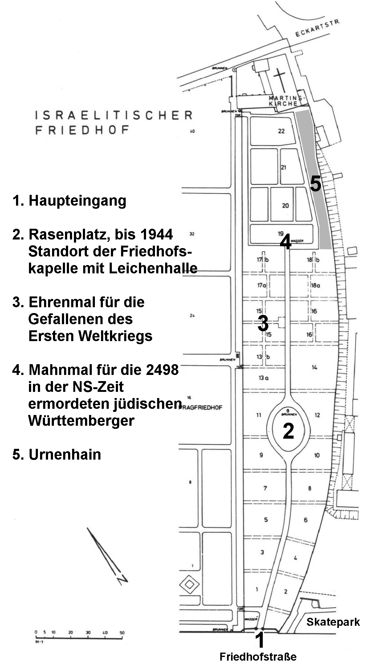 Plan des israelitischen Teils des Pragfriedhofs in Stuttgart. Karte des Friedhofsamtes der Stadt Stuttgart vom 5. Oktober 1987 mit Eintragung der Abteilungen des Friedhofs (Nummer 1-22, die Steine an den Abteilungsgrenzen tragen die römischen Zahlen I-XXII).